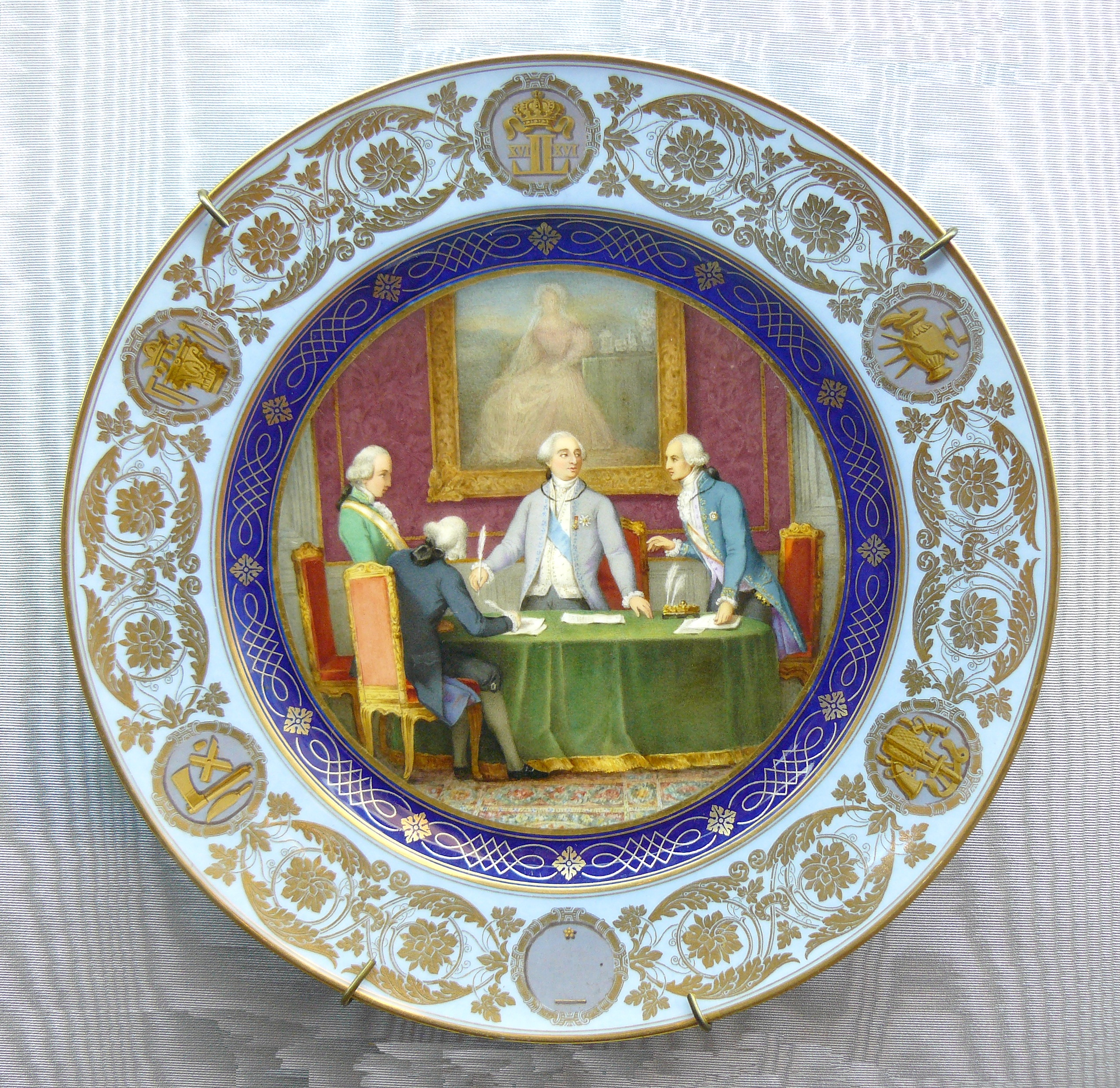 Assiette en porcelaine de Sèvres du service du palais de Fontainebleau, 1836 - - Décors d'après Monvoisin - Musée national de céramique (Sèvres, Hauts-de-Seine, France) Inv n° MNC 6589